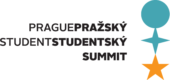 PSS logo 2011